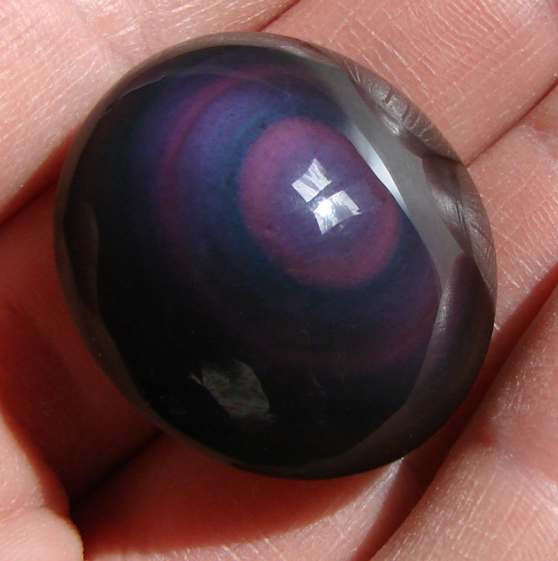 Obsidian Cabochon, rund, Durchmesser 3,5 cm